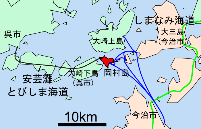 岡村島の位置図